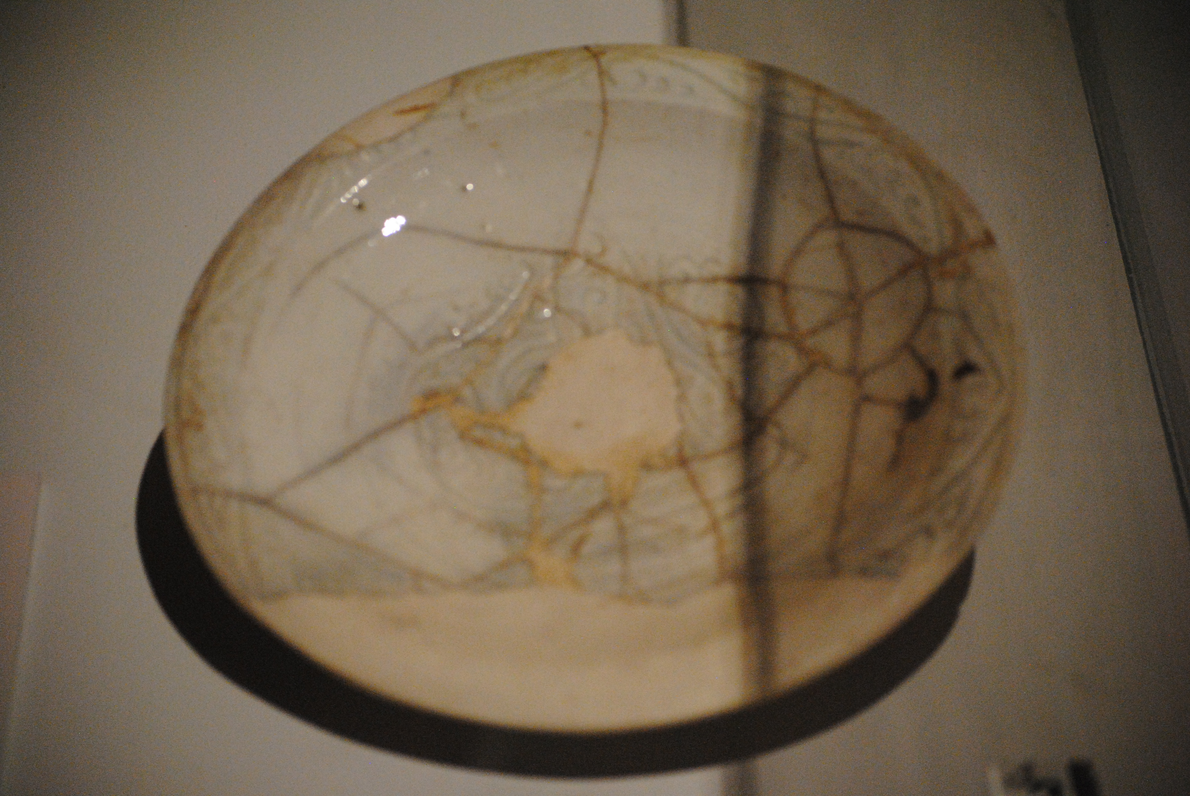 Piatto invetriato monocromo inciso usato come bacino ceramico - importato dall'Egitto nella metà dell'XI secolo (chiesa di Santo Stefano extra moenia, Pisa) - Museo nazionale di San Matteo